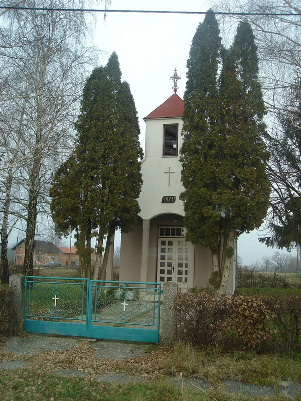 Dulepska - Kapelica